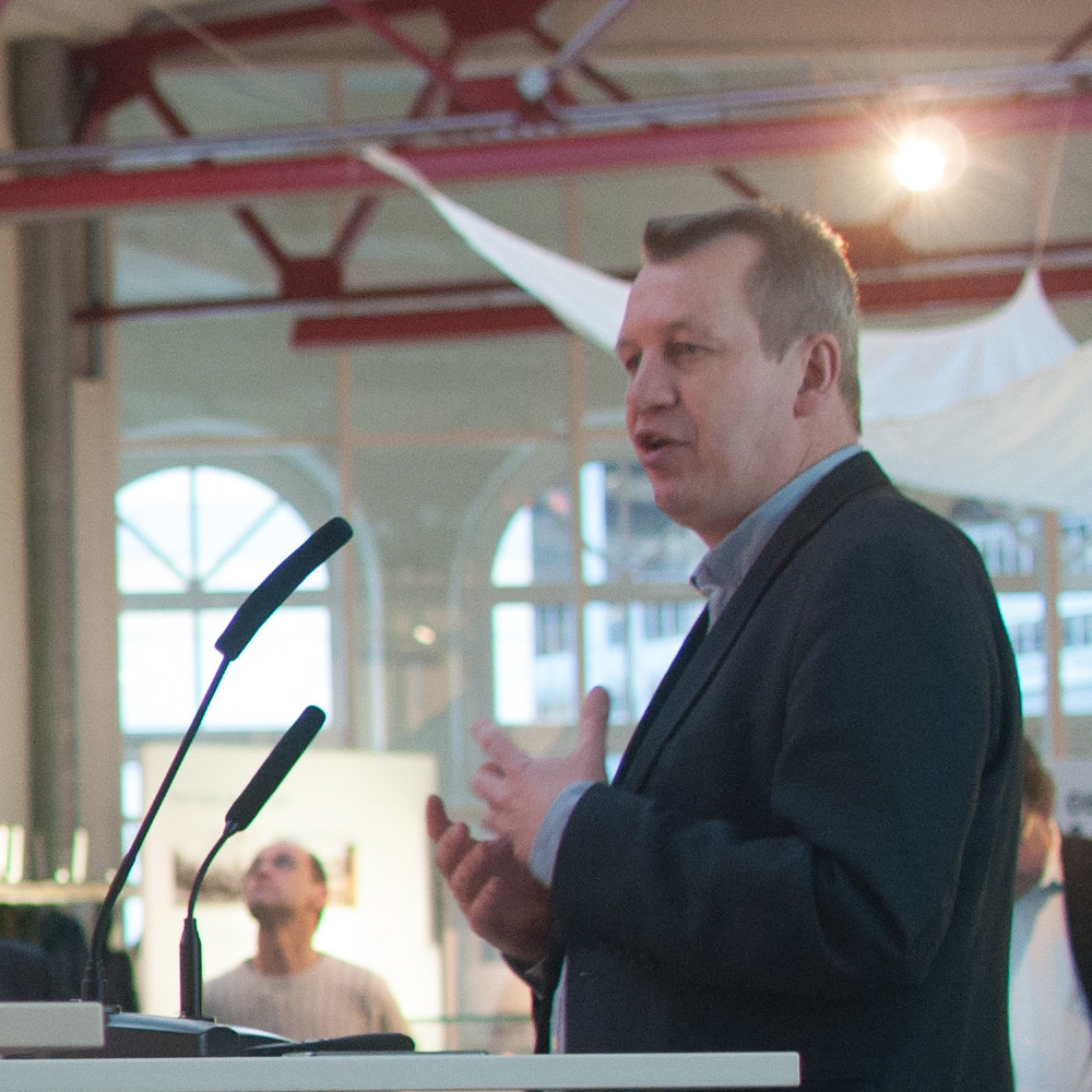 Eröffnung von mainzedZWEI17 durch Prof. Dr. Kai-Christian Bruhn (links im Bild). Fotograf: Matthias Dufner